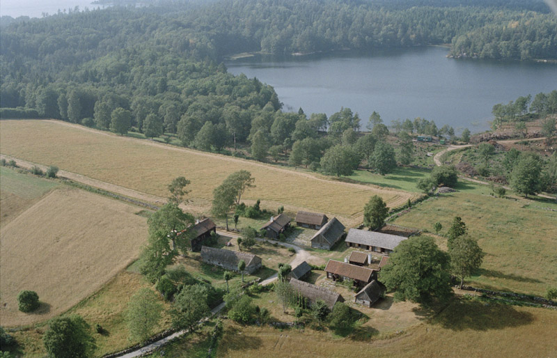 Äskhults by. Bilden är tagen mot (väderstreck): NV Motiv: Äskhult Nyckelord: Flygbilder, Kulturreservat, Riksintressen Kategori: Jordbruksby Äskhults by. Bilden är tagen mot (väderstreck): NV.